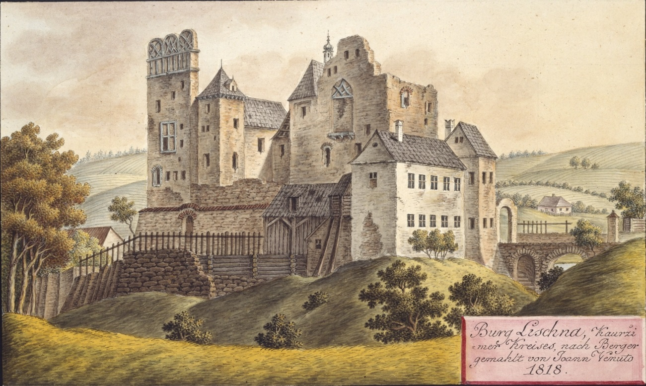 Líšno (zámek). Burg Lischna, Kauřzimer Kreises, nach Berger gemahlt von Joann Venuto 1818